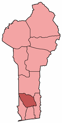 Mappa della diocesi di Abomey, nel Bénin. Lavoro personale, eseguito a partire da questa immagine di Commons. Fonte per i confini delle diocesi: Guida delle missioni cattoliche 2005, a cura della Congregatio pro gentium evangelizatione, Roma, Urbaniana University Press, 2005. Categoria:Chiesa cattolica in Benin